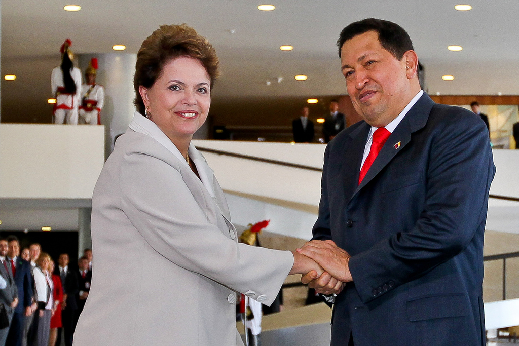 Presidenta Dilma Rousseff durante Cerimônia oficial de chegada do presidente da Venezuela, Hugo ChávezBrasília - DF